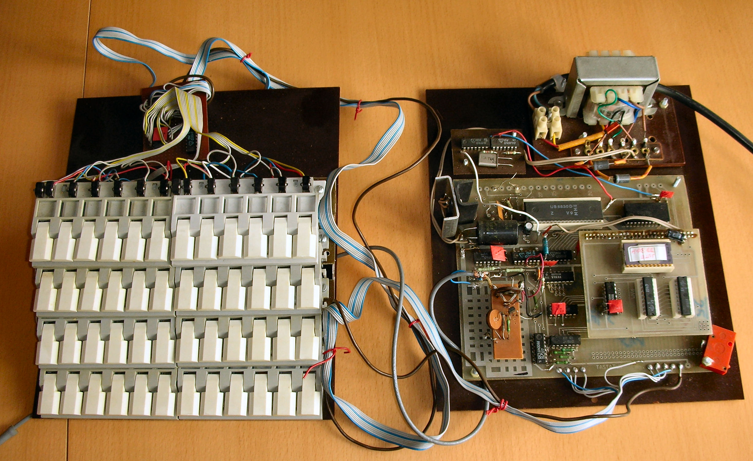 JU-TE-Computer (Computer mit Einchip-Mikrorechner nach nach Dr. Helmut Hoyers Bauanleitung in der Zeitschrift "Jugend und Technik"